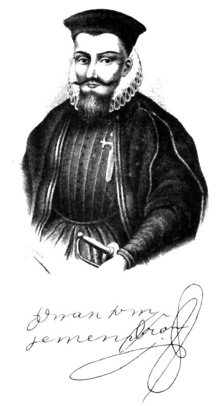 Antonio de Mendoza y Pacheco (¿1490-1493? - 1552) Primer virrey de la Nueva España (1535-1550) y segundo del Perú (1551-1552).